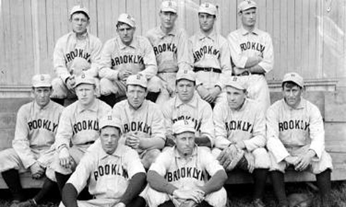 1900 Brooklyn Superbas